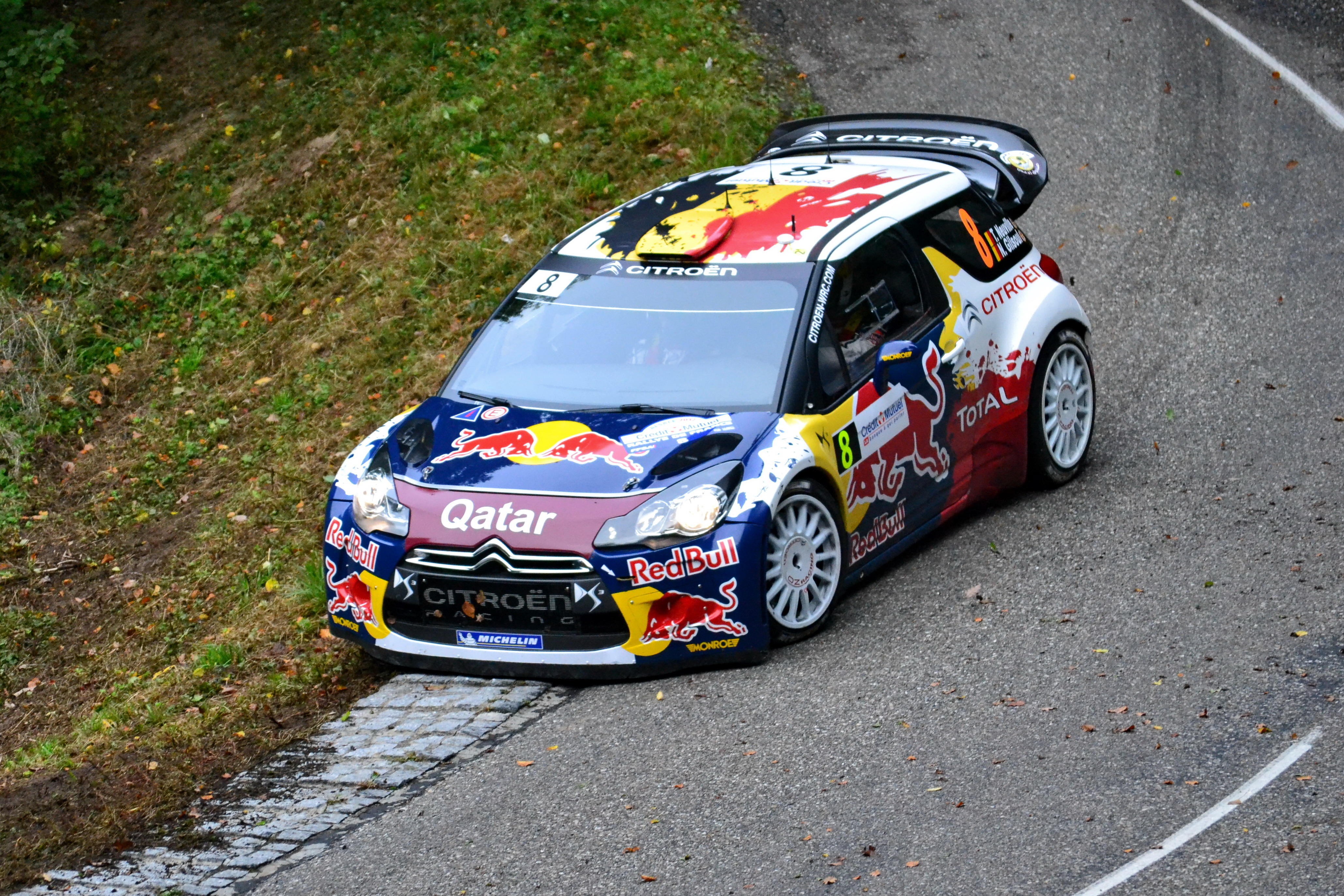 Rallye WRC France-Alsace 2012, ES2 Hohlandsbourg-Firstplan 1. Citroën DS3 WRC - Thierry Neuville / Nicolas Gilsoul